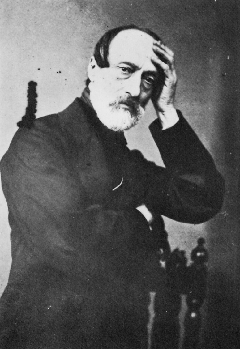 Gebrüder Alinari: Giuseppe Mazzini